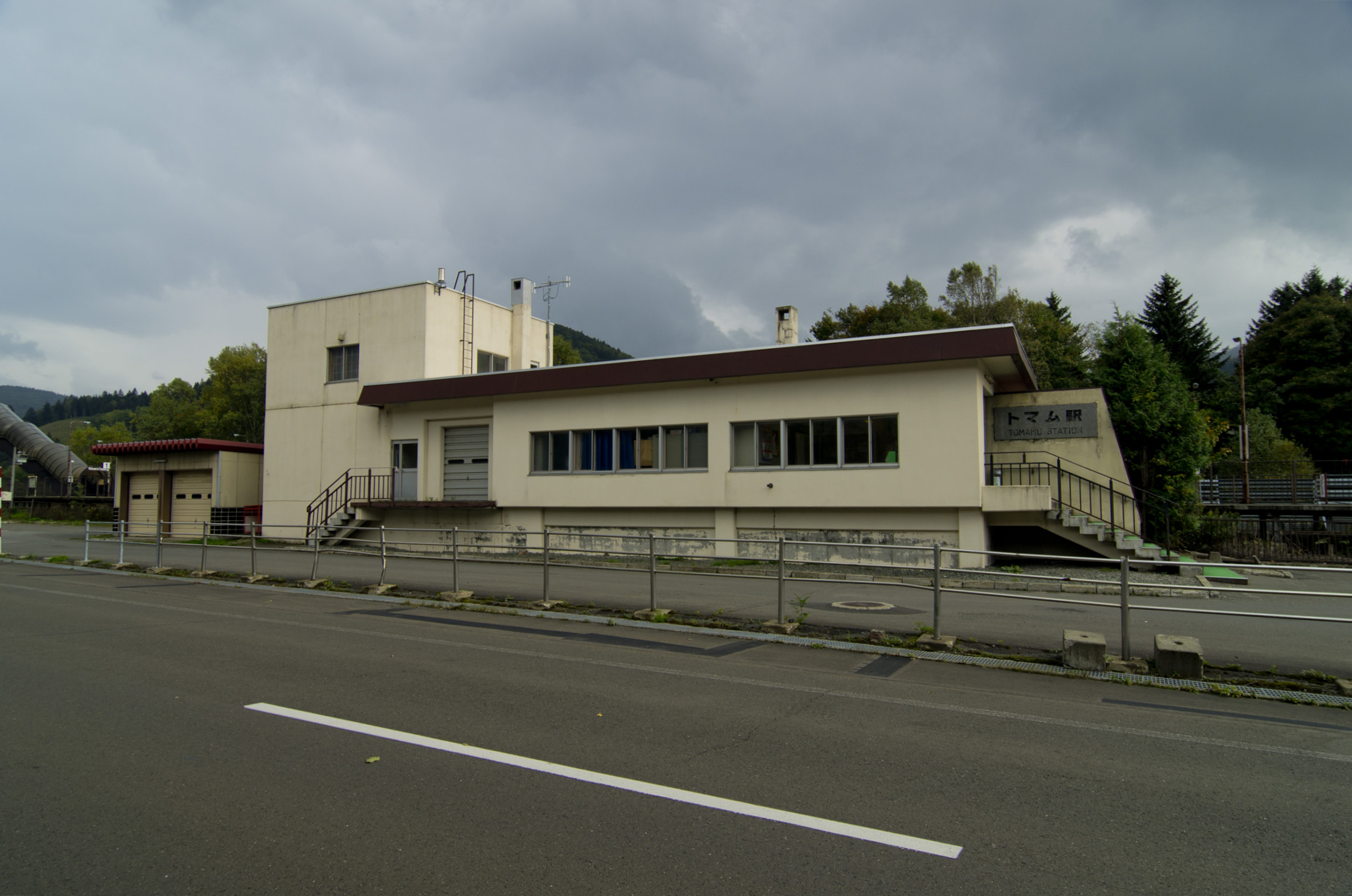 北海道旅客鉄道株式会社石勝線トマム駅駅舎